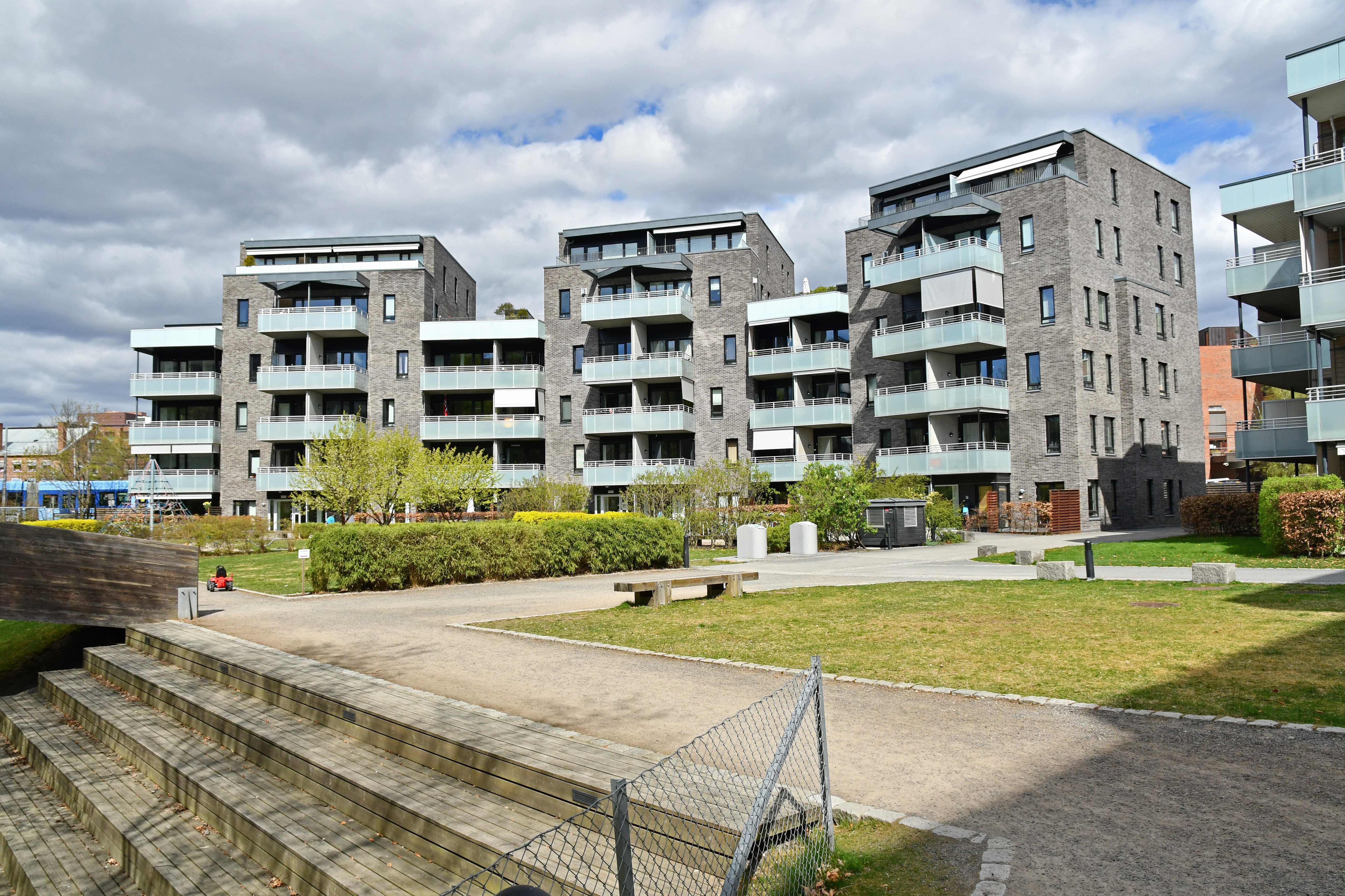 Nedre Skøyen vei 10 boliger fra 2007 sett fra Hoffselva